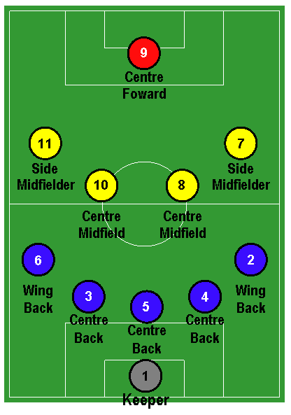 mia creazione